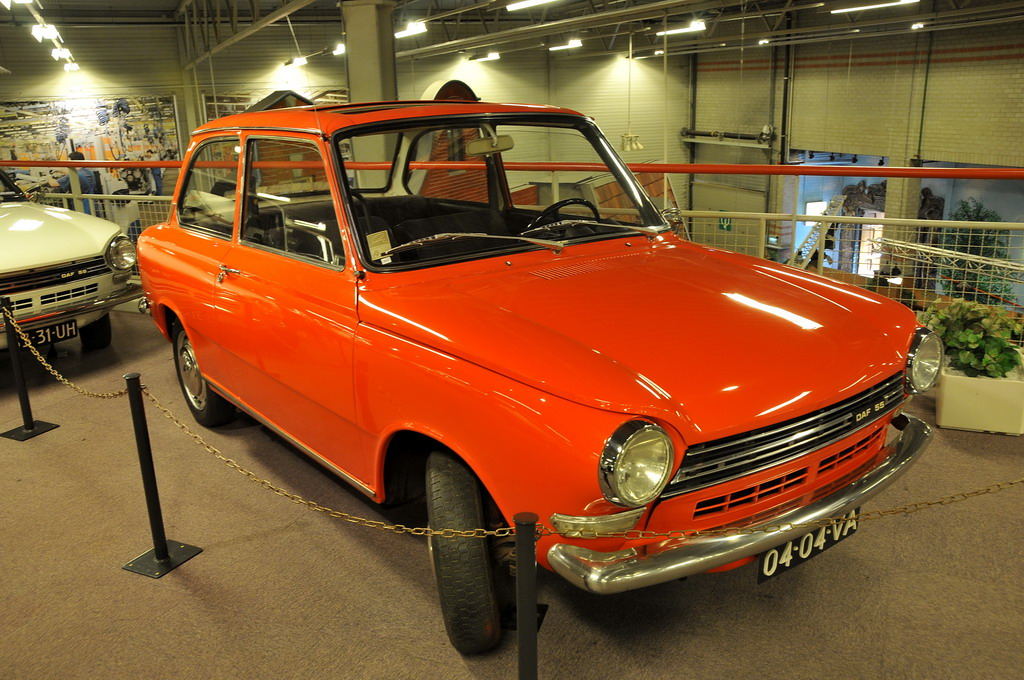 Type 5502. 4 cilinder lijnmotor 1108cc. Vermogen 50 SAE Pk. Variomatic aandrijving.